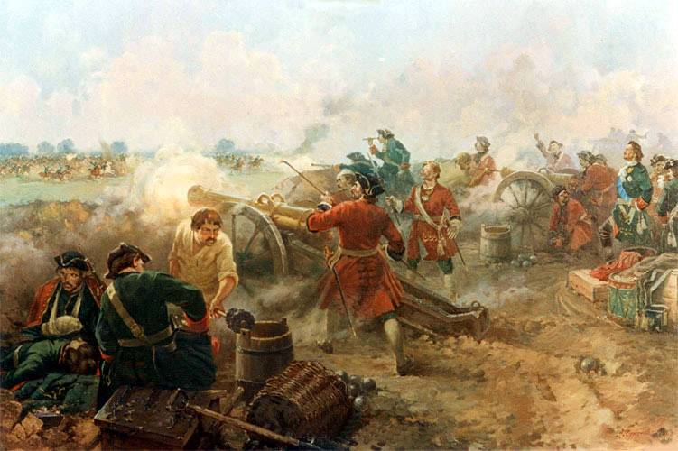 Detail of Diorama of Battle of Poltava, depicting Russian artillery firing from a entrenched position against the Swedish cavalry. From the Battle of Poltava History Museum.